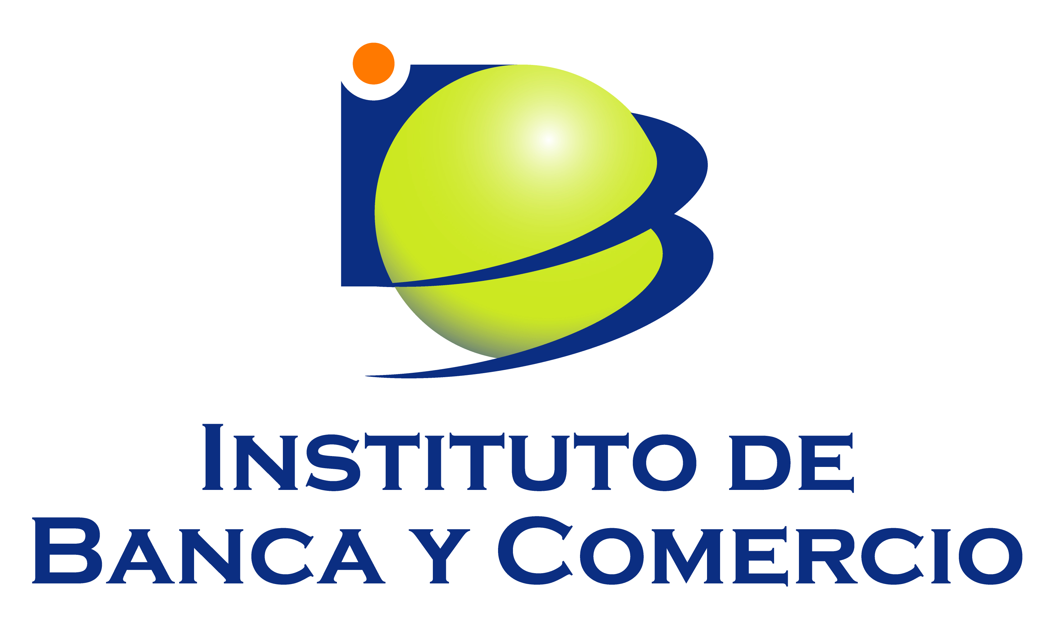 Logo IBC